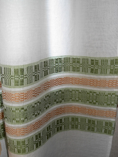 Gardintyg med mönsterbård i munkabälte.